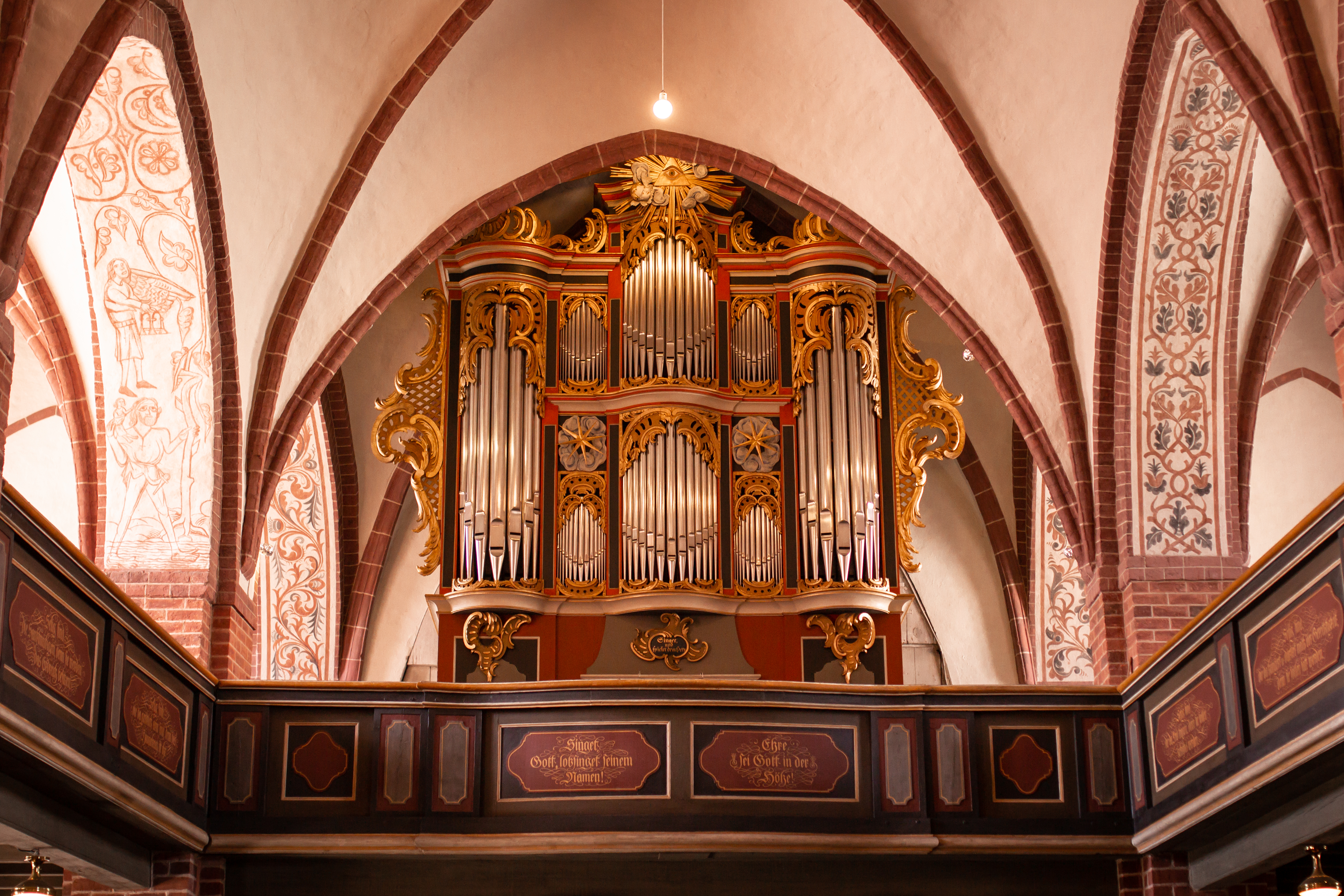 Scholtze-Orgel der evangelischen Stadtkirche St. Katharinen in Lenzen (Elbe). Canon EOS 600 D + Sigma 35mm 1.4 ART. 1/125s, f1.8, ISO 400